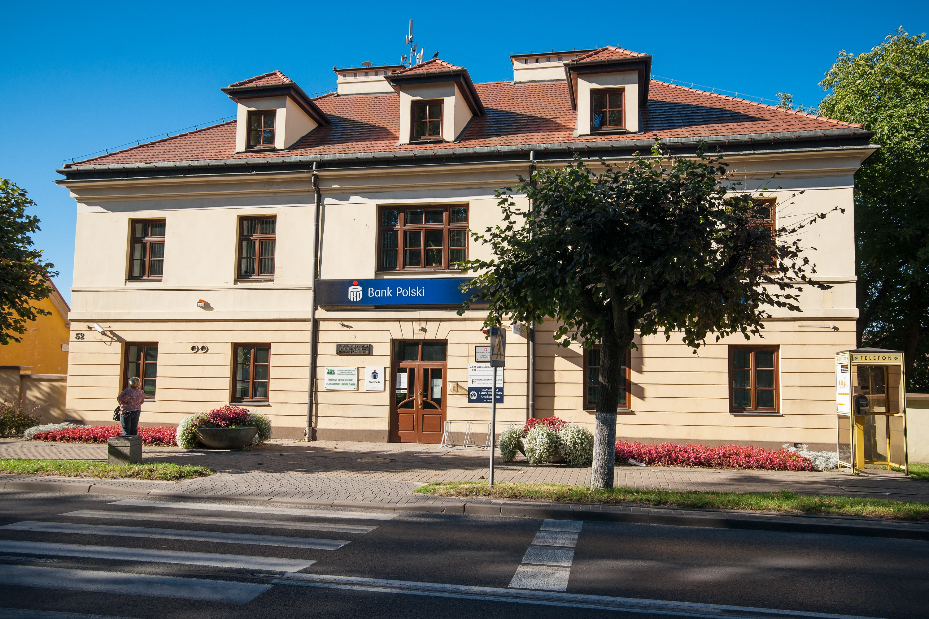 Janów Lubelski, budynek Kancelarii Obwodu Ordynacji Zamojskiej, 1818-1823